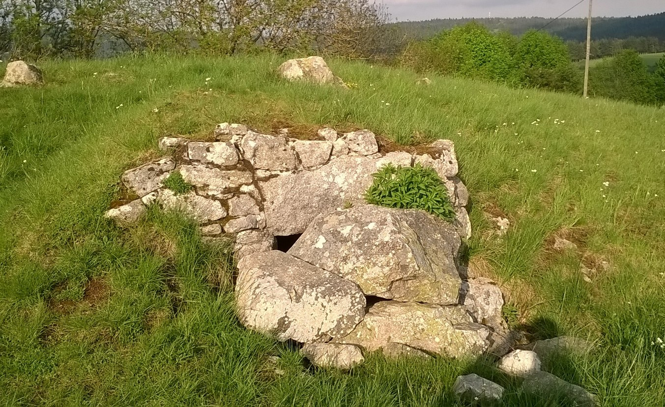 montregard11